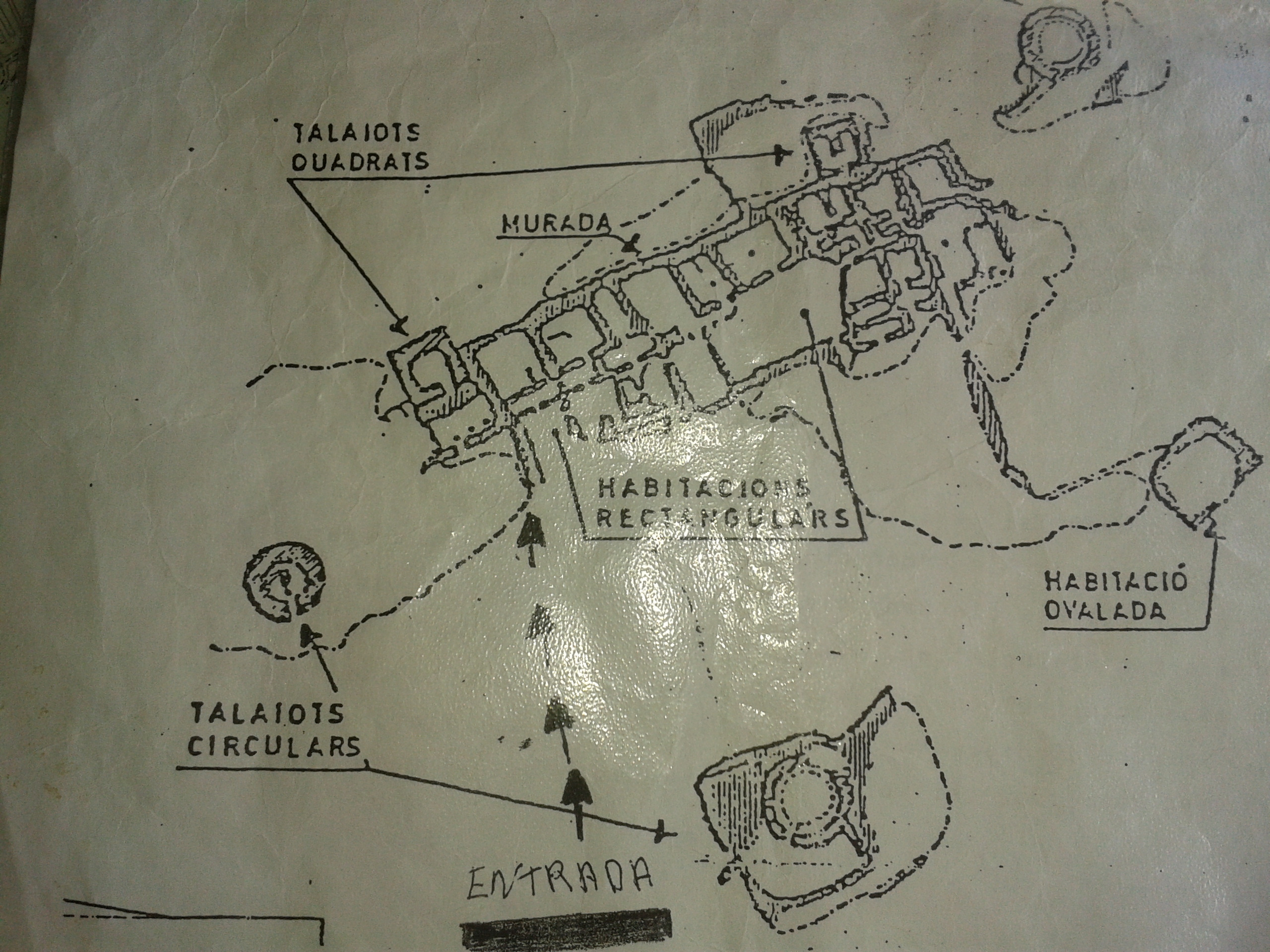 Foto de un plano del poblado de Capocorb Vell, situado en el municipio de Llucmajor, Mallorca.